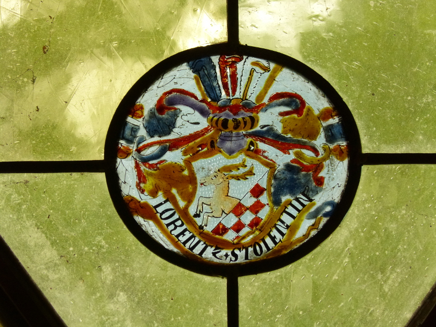 Kirche St. Michael in Unieradz, Wappendarstellung Fam. Stojentin Fenster